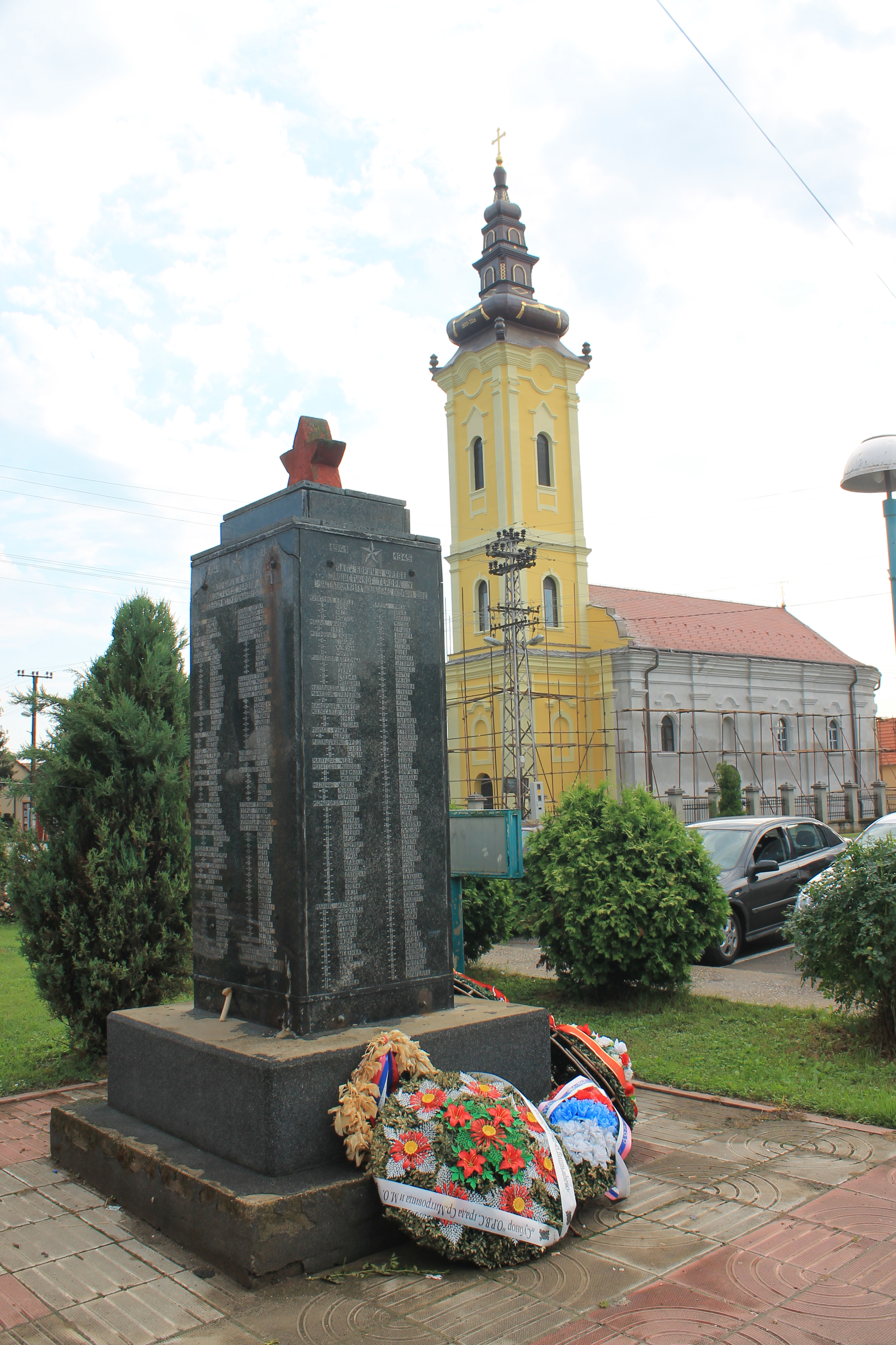 Višnjićevo